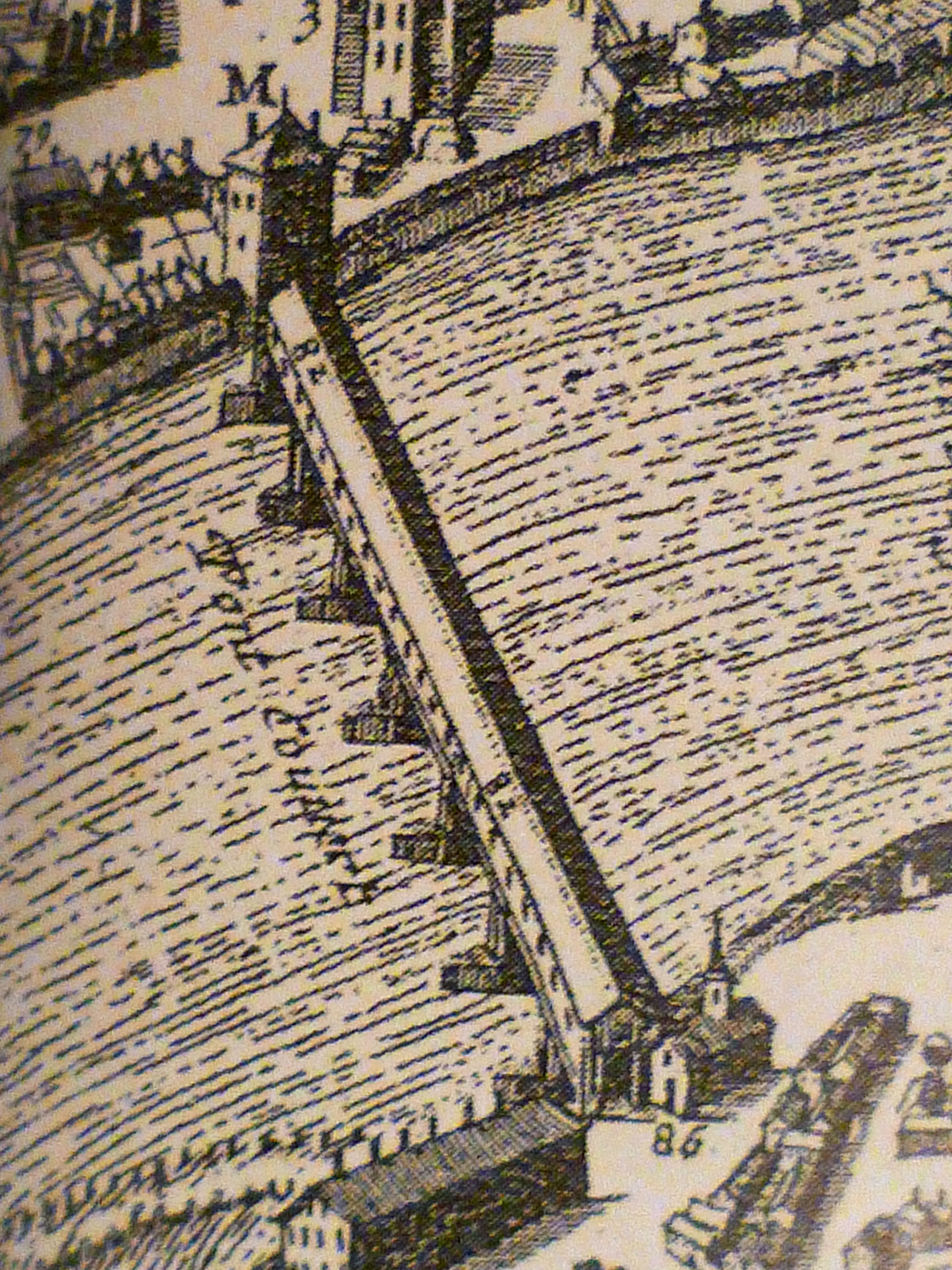 Le Pont de la Dalbade (Pont Couvert depuis 1480) sur le plan de Melchior Tavernier. Le n°86 correspond à l'hôpital Saint-Jacques.